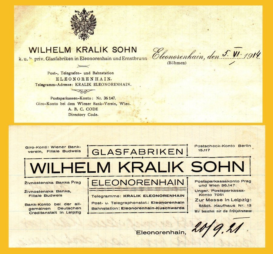 Briefkopf Eleonorenhain